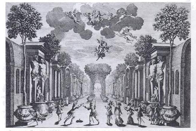 Cenário para a peça Andromêde, de Corneille